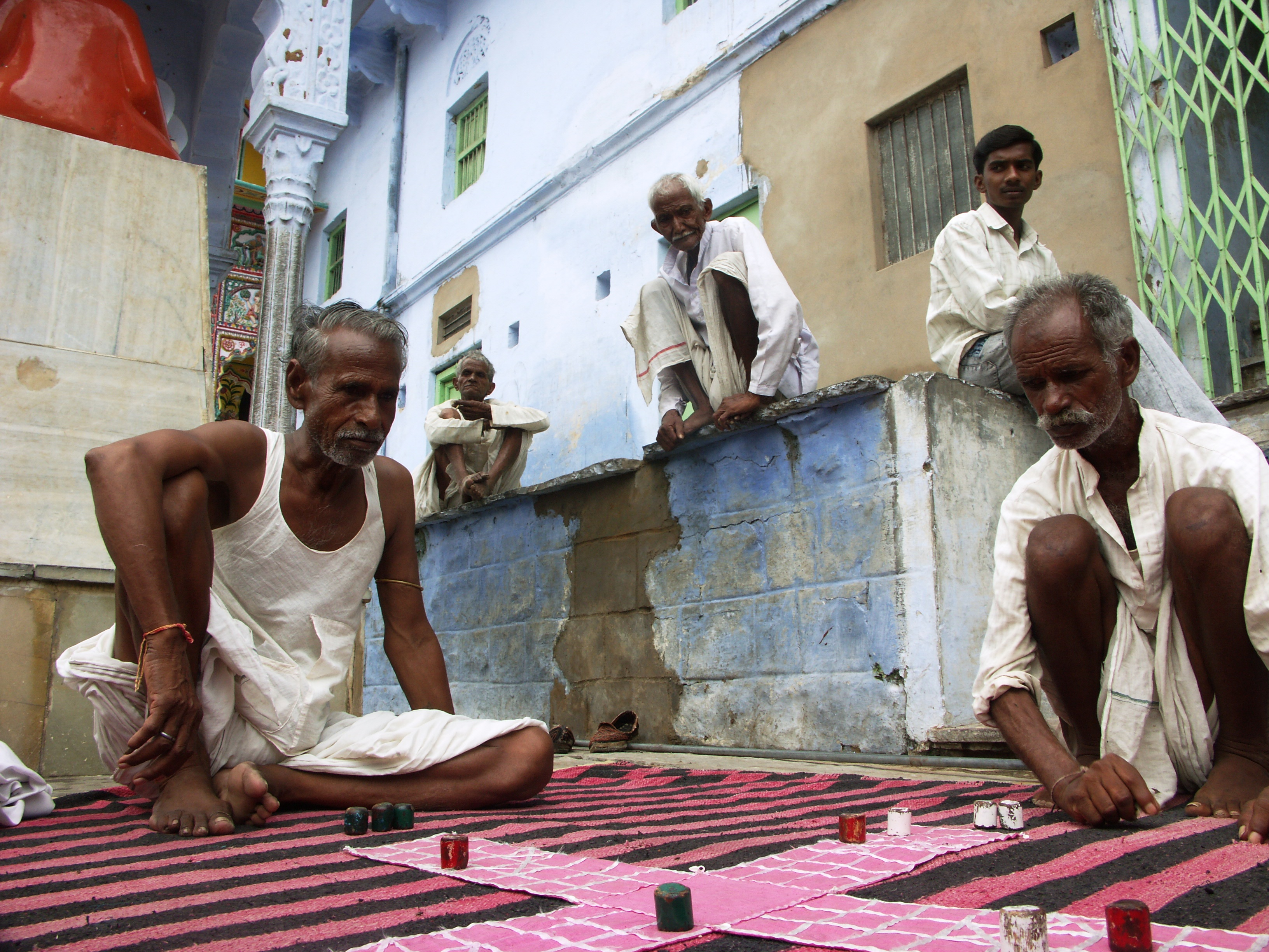 Joueurs et public d'un jeux de rues